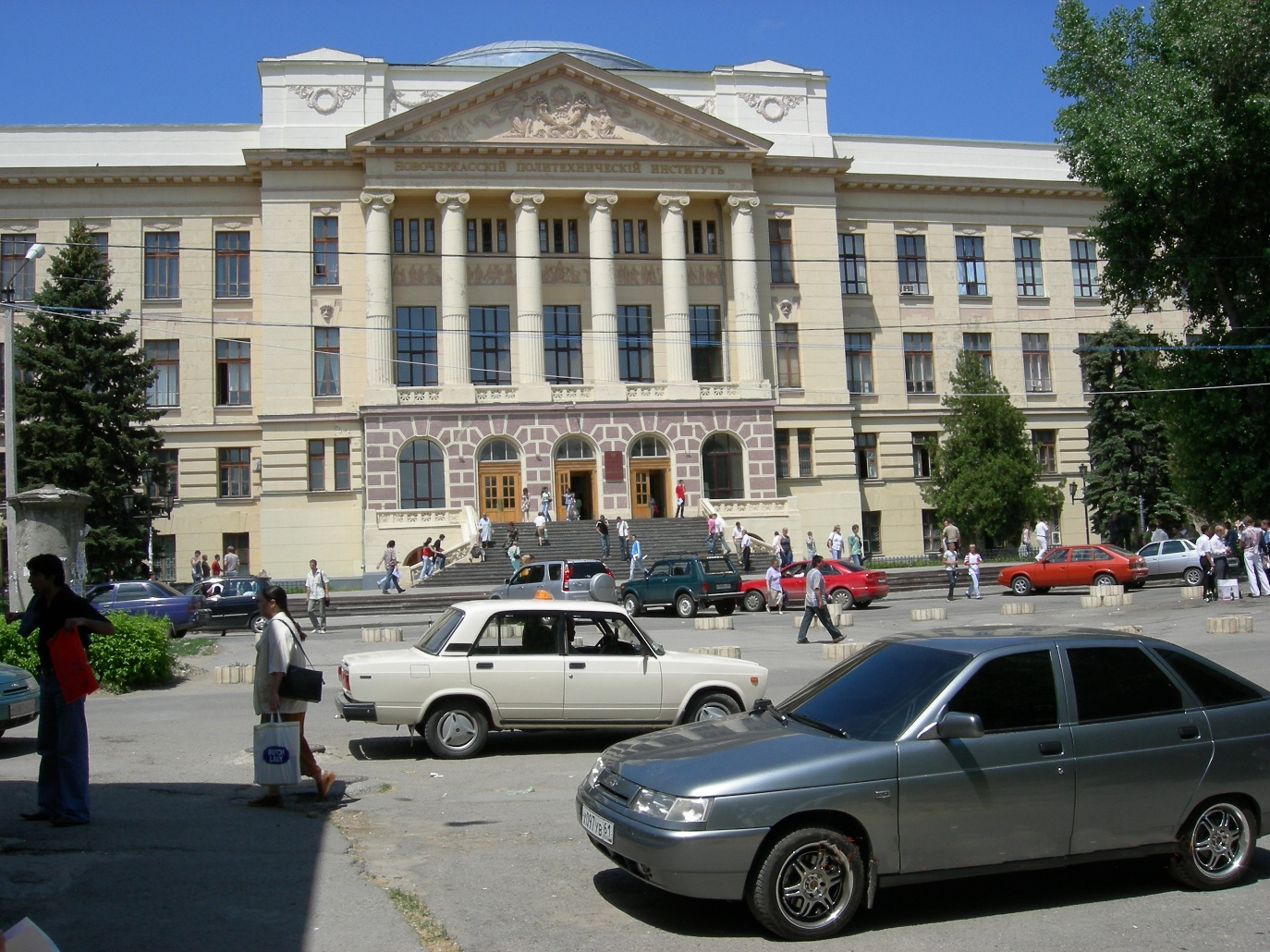 Изображение | Описание = Главный корпус ЮРГТУ | Автор = Путилин Денис | Время создания = 7 июня 2006 | Источник = Главный корпус ЮРГТУ. Южно-Российский государственный технический университет (Новочеркасский политехнический институт) — крупнейший университет на юге России, на его факульеьах и филиалах учатся 22000 студентов. Открыт в 1907 году. Первоначально именовался как Донской политехнический институт. Комплекс зданий Южно-Российского государственного технического университета.(главный, химический, горный и энергетический корпуса) является объектом культурного наследия федерального значения. Стиль — неоклассицизм. Архитектор Б.С Рогуйский. 1911—1930 гг.